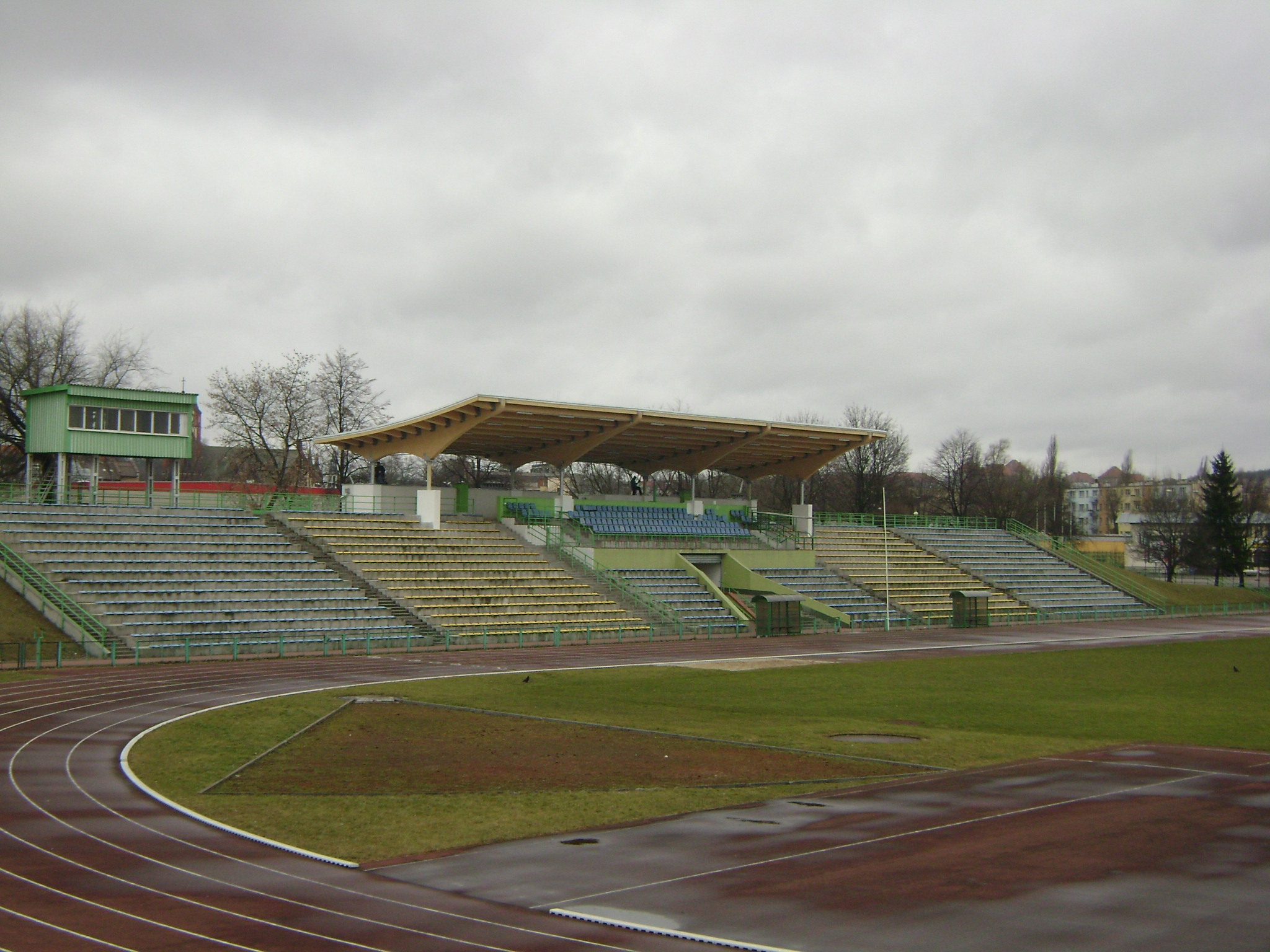 Stadion GKS "Olimpia" w Grudziądzu (trybuna główna)